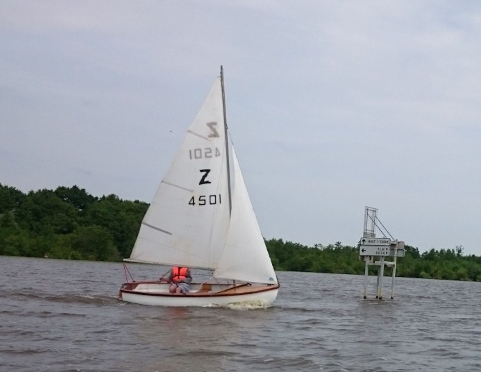 dériveur zef naviguant sur la rivière Erdre